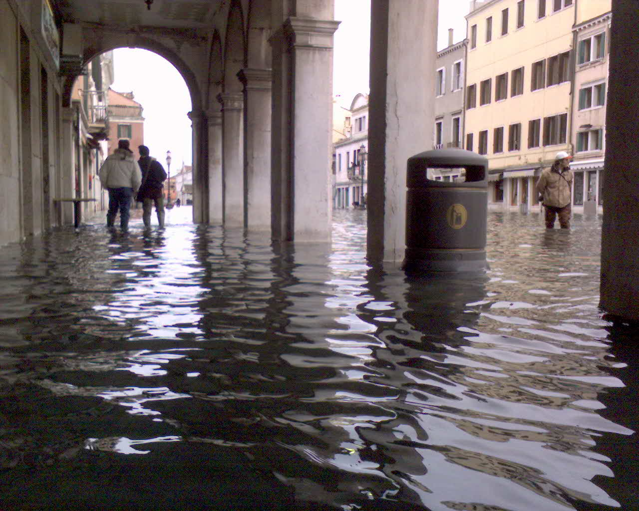 Chioggia: acqua alta nel centro storico (1° dicembre 2008).